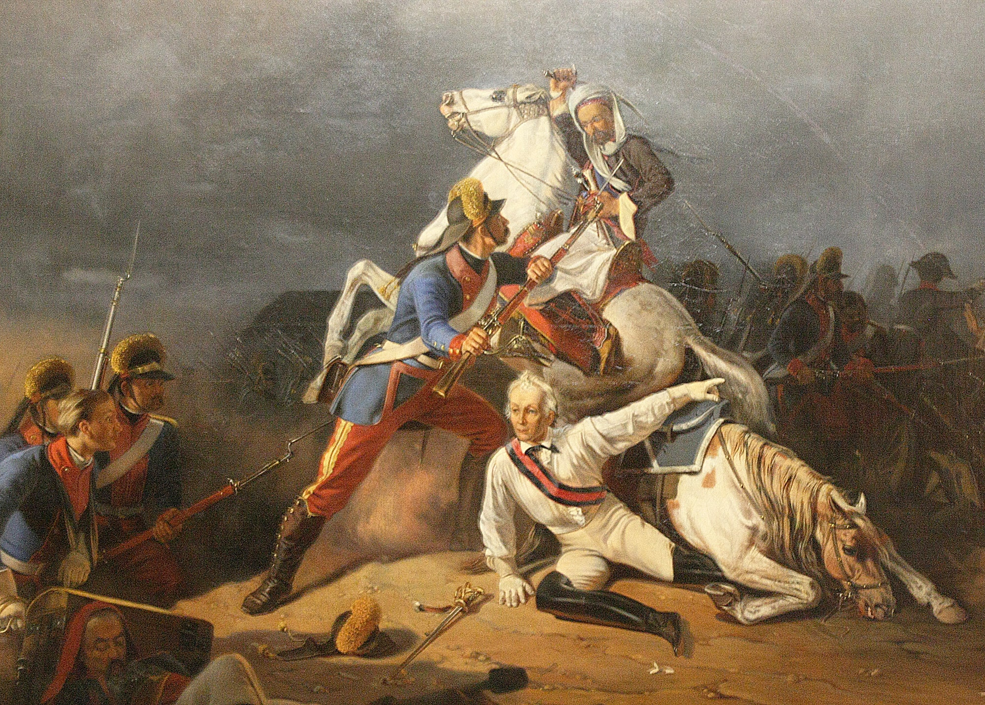 Grenadier Novikov saves Suvorov